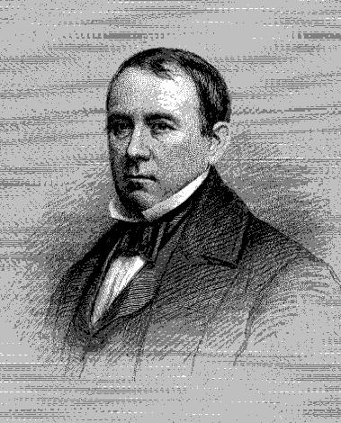 James Campbell (Postmaster General)James Campbell (US Postmaster General 1853-57)